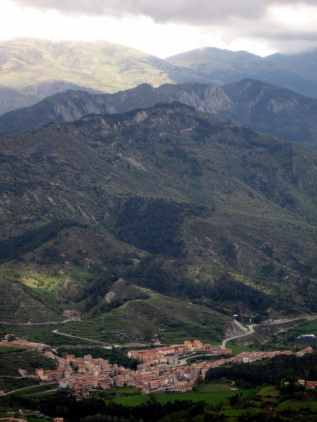 Vista de la Pobla de Lillet (Berguedà, Catalunya) des del santuari de Falgars